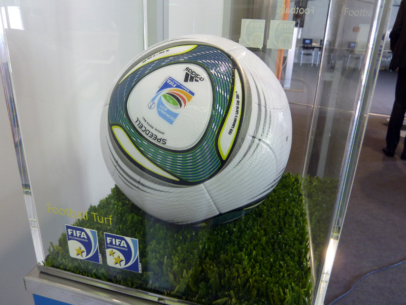 Speedcell offizieller Spielball der FIFA Fußball-Weltmeisterschaft der Frauen 2011